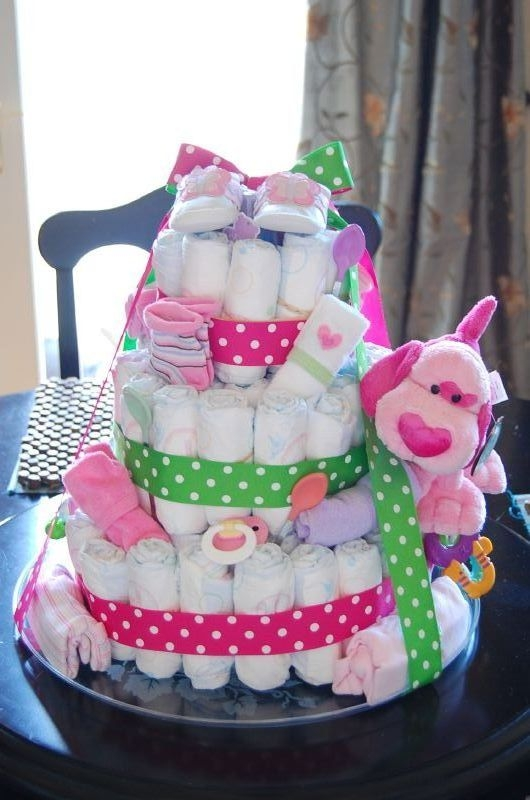 Eine selbst gebastelte Windeltorte (engl. Diaper Cake).